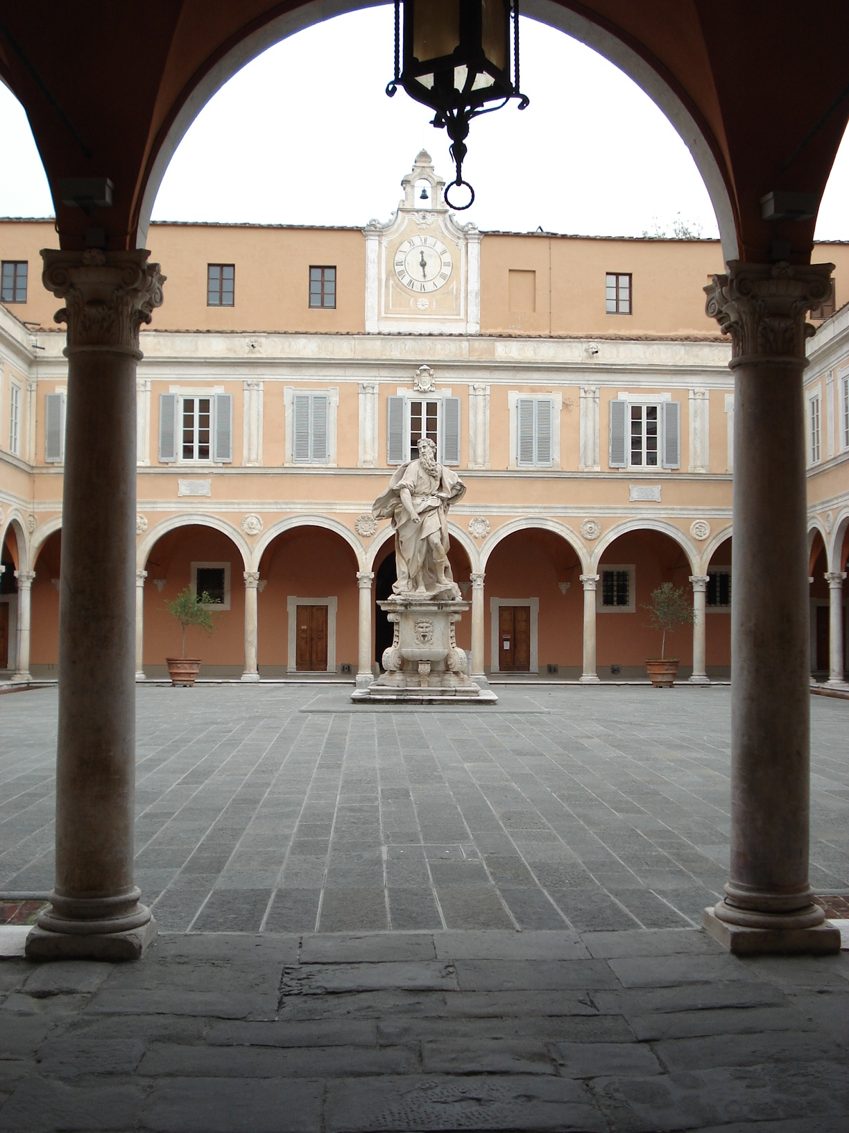 Pisa, Palazzo Arcivescovile, cortile interno